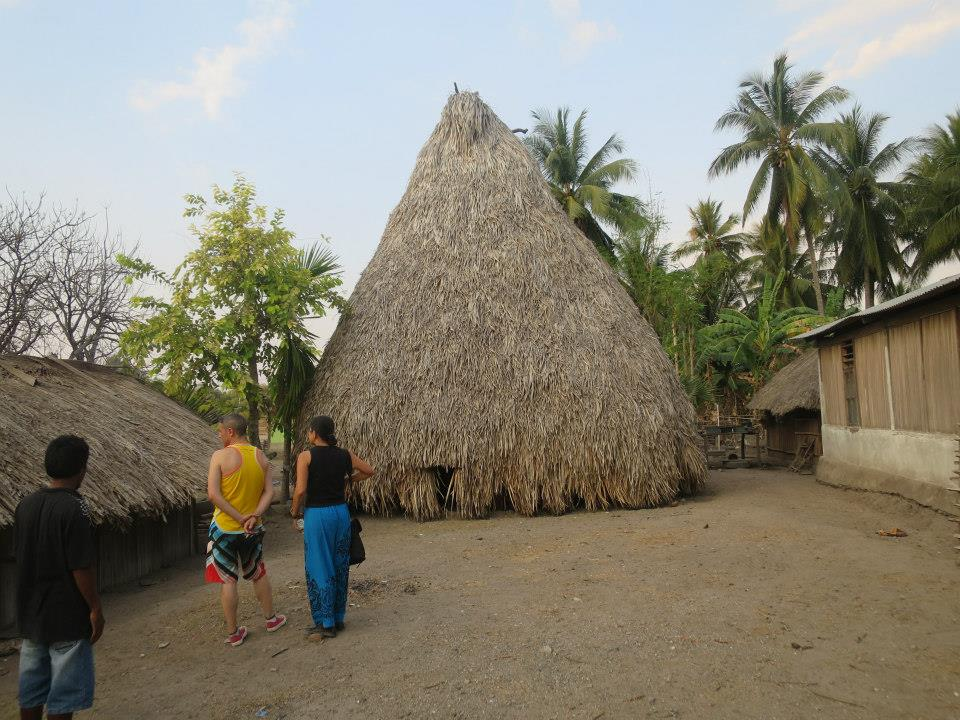 Im Dorf Biacou, Suco Aidabaleten